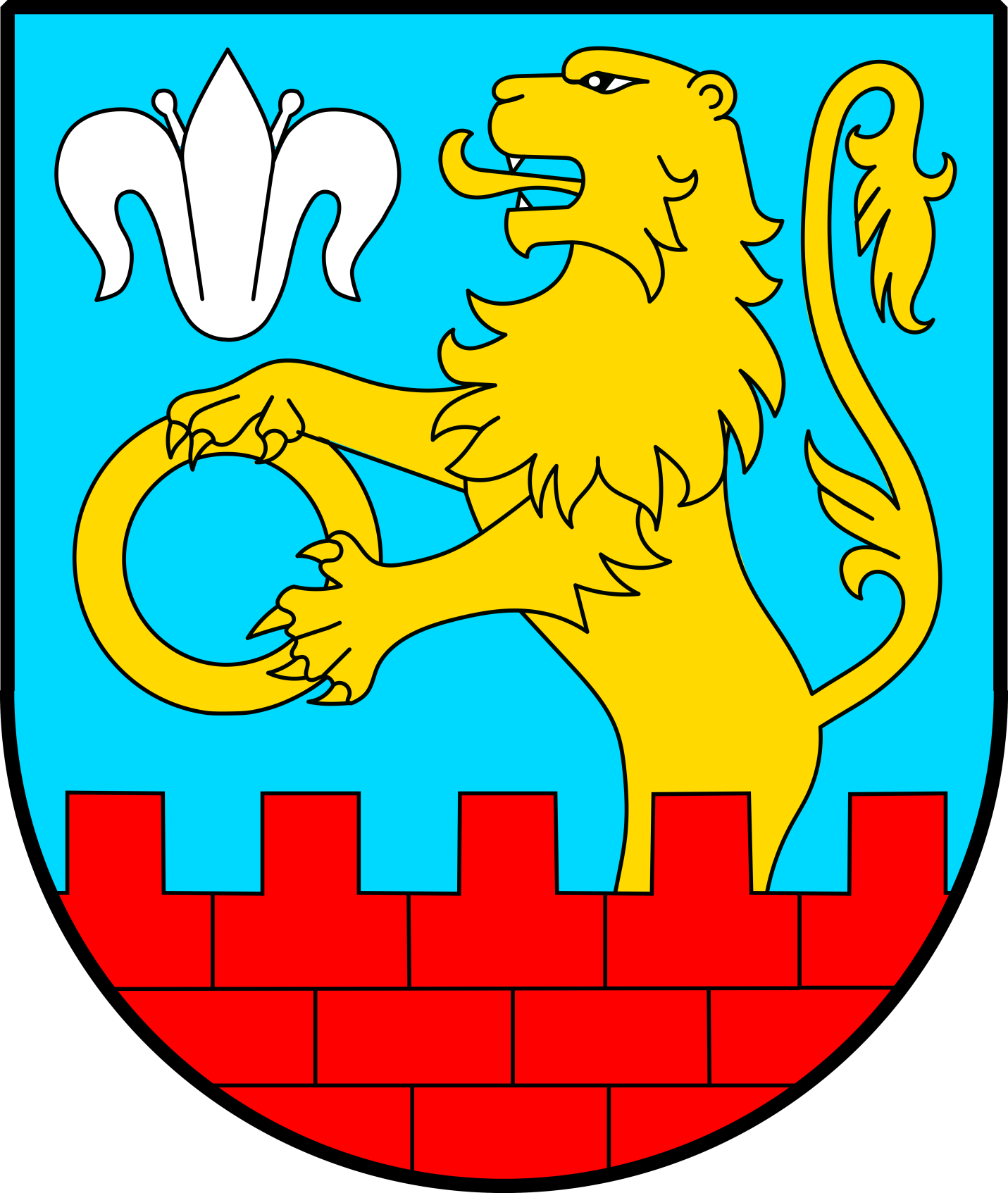 Herb gminy Kutno.